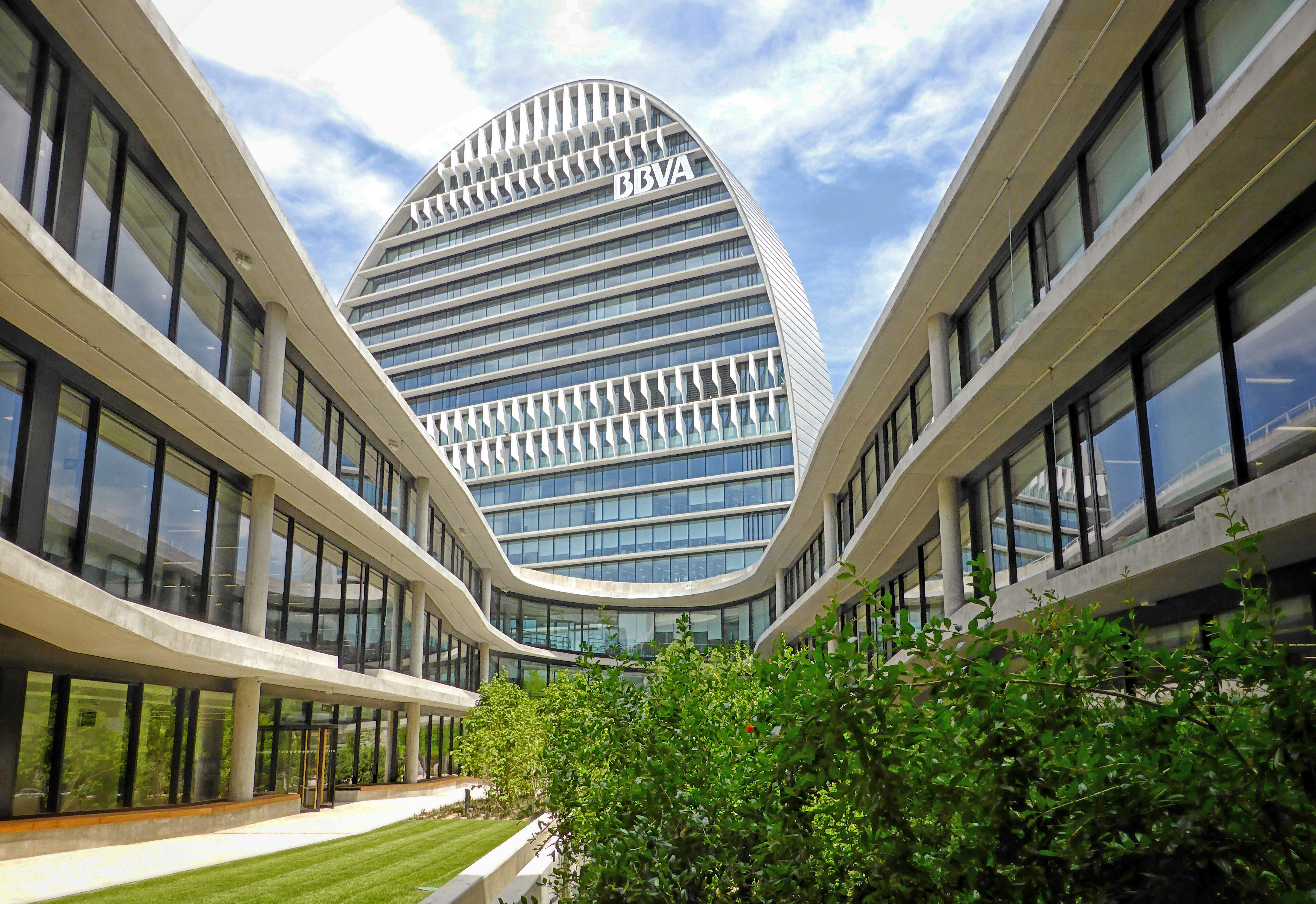 La Vela BBVA, Madrid, España